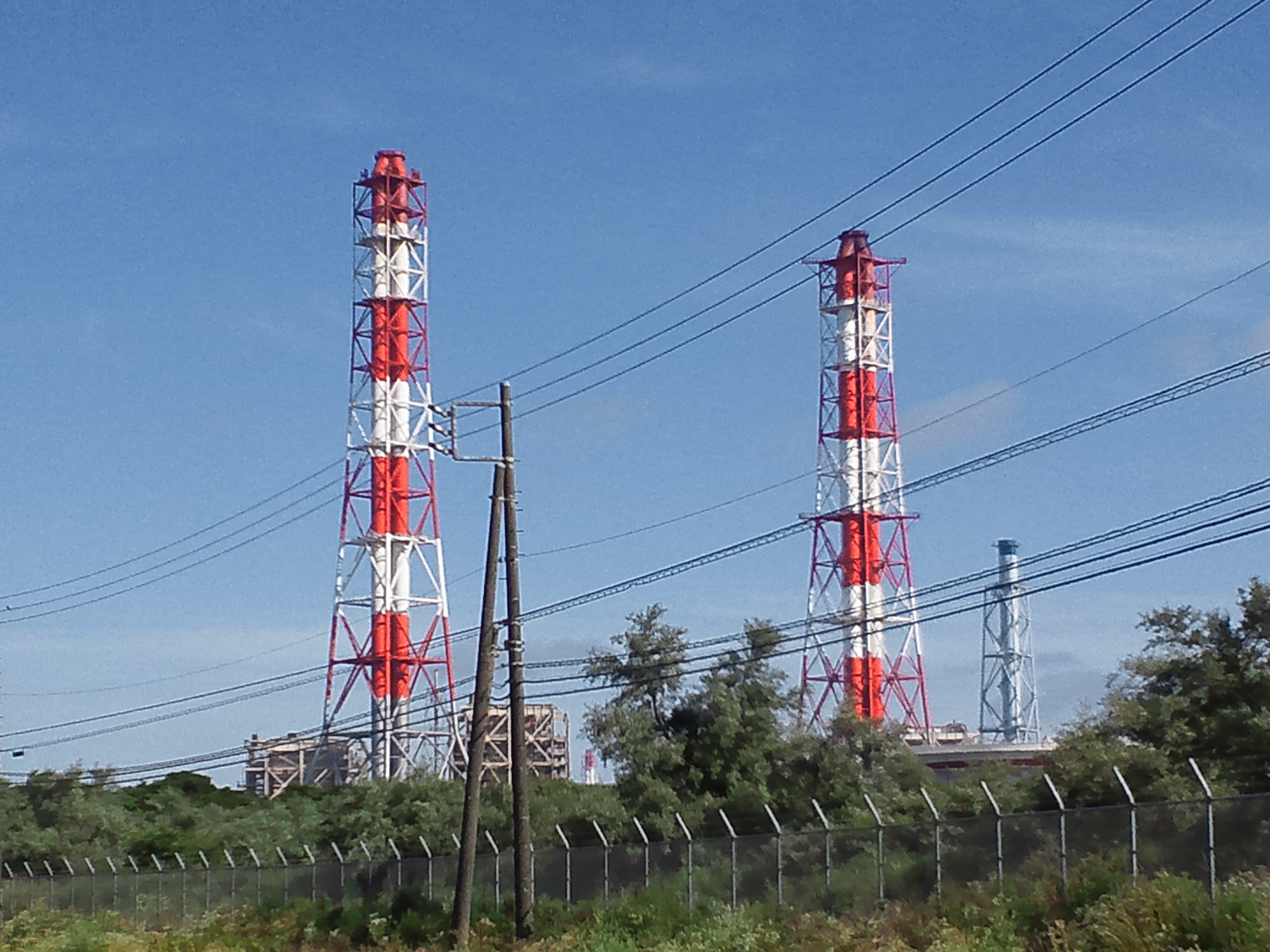 鹿島共同火力鹿島共同発電所